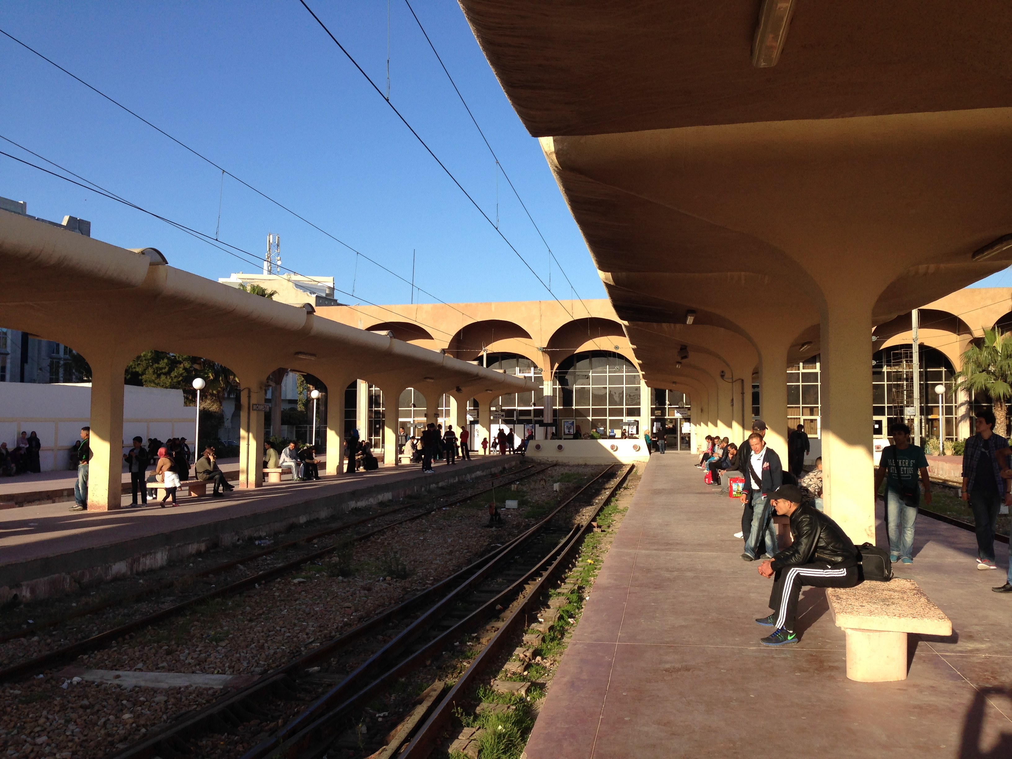 Quais de la gare de Monastir (Tunisie)